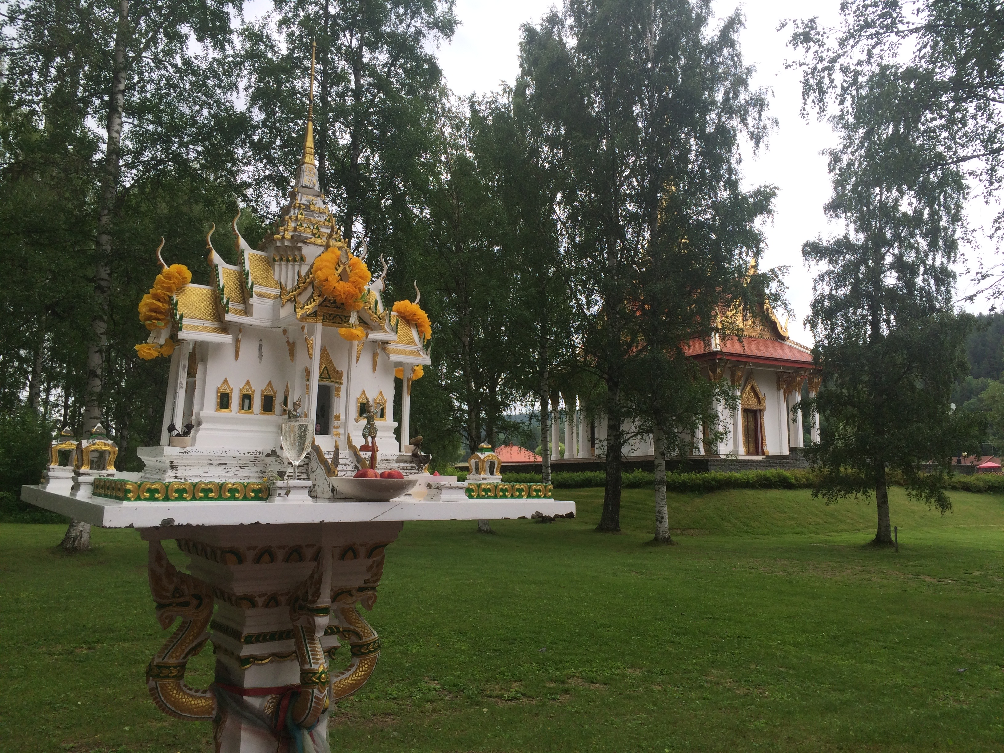 Åndehus ved Thailändska Paviljongen, Ragunda, Sverige. Paviljongen i bakgrunnen